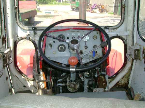 Traktor vom Typ Fortschritt ZT 300, Führerstand.